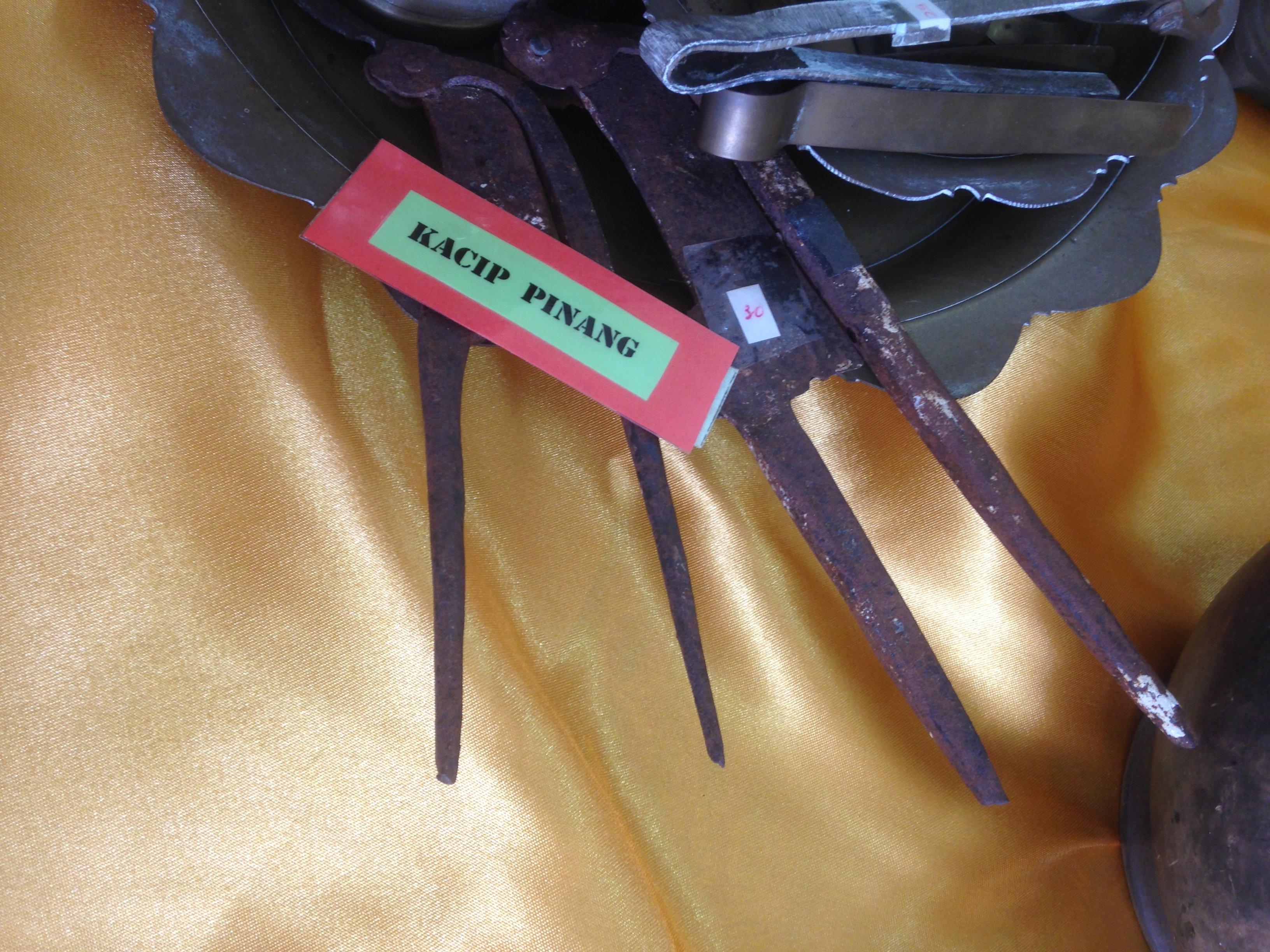 KACIP PINANG